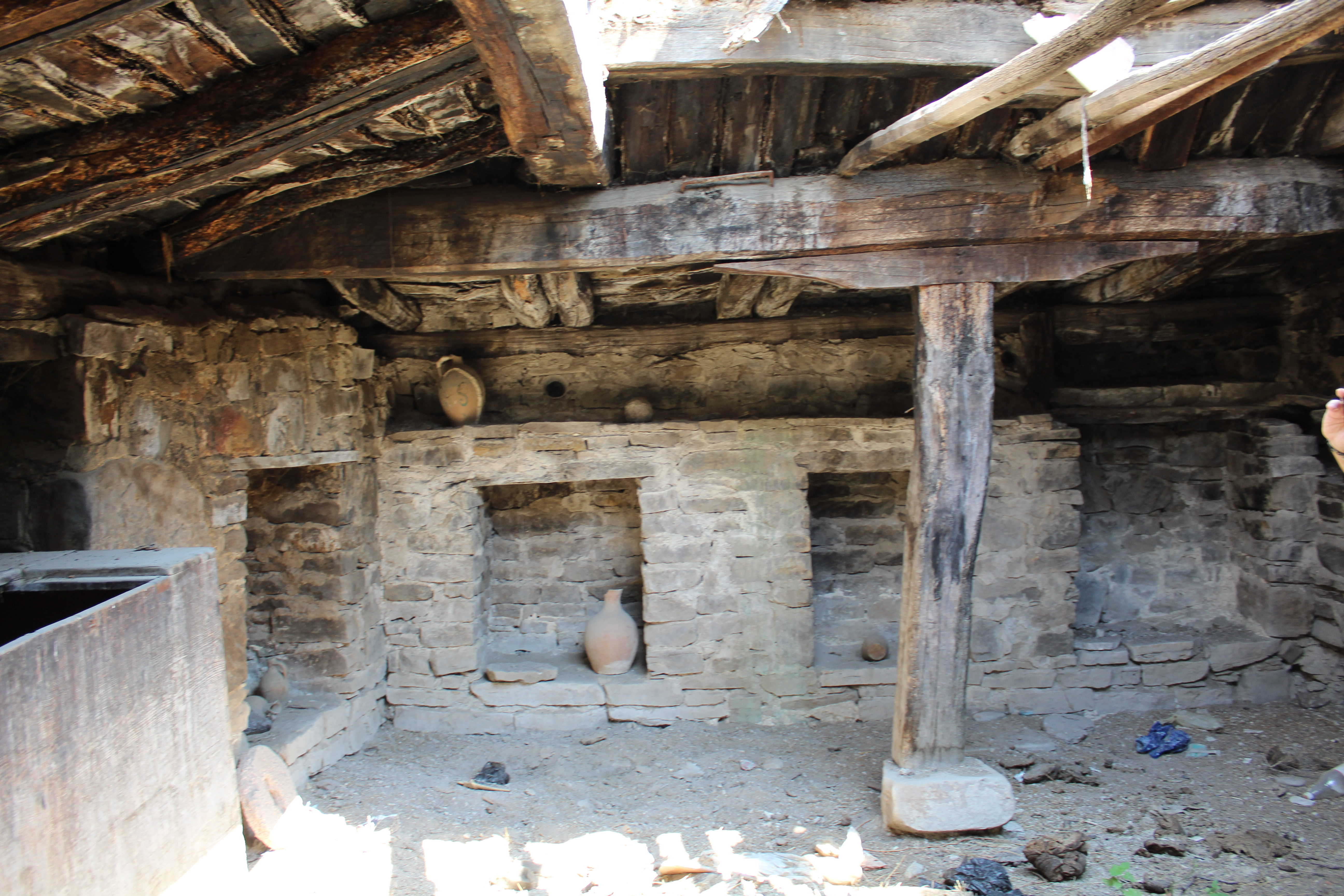 მარჯანიძეების სახლი-დარბაზი — არქიტექტურული ძეგლი კასპის მუნიციპალიტეტის სოფელ წინარეხის ძველ უბანში, ღვთისმშობლის ეკლესიის მახლობლად.